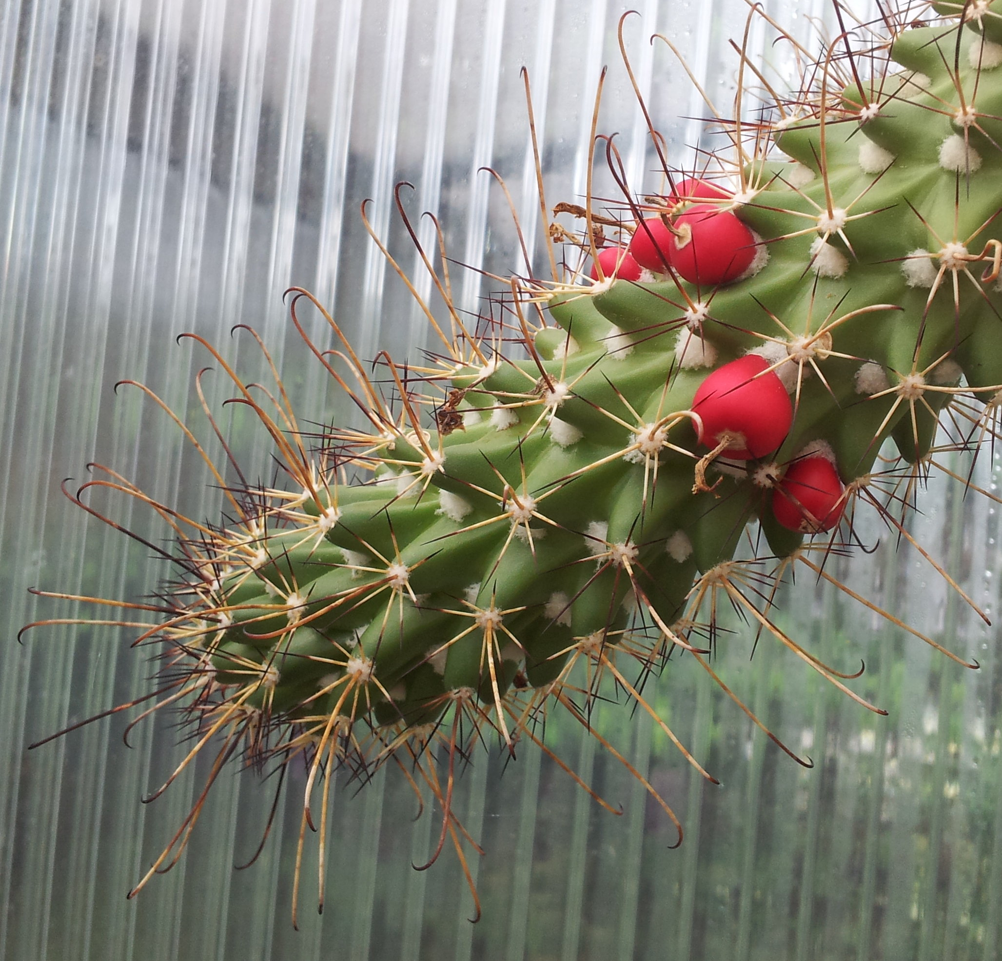 Mammillaria poselgeri mit Früchten